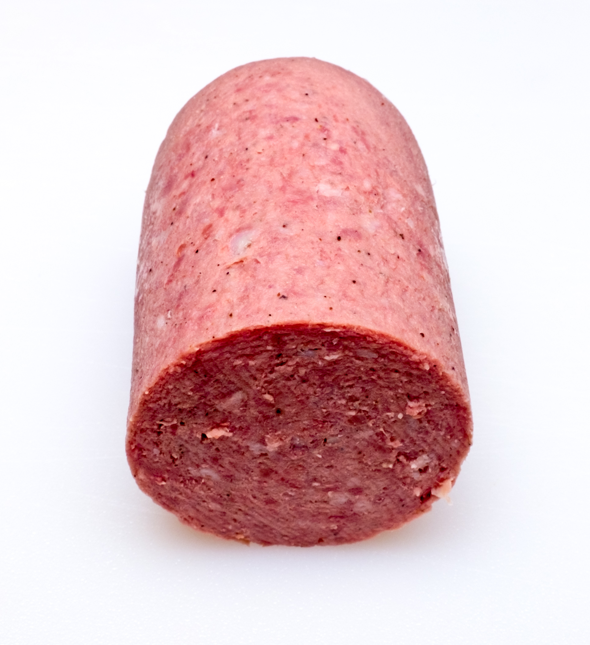 A Dominican Salami (Induveca brand)